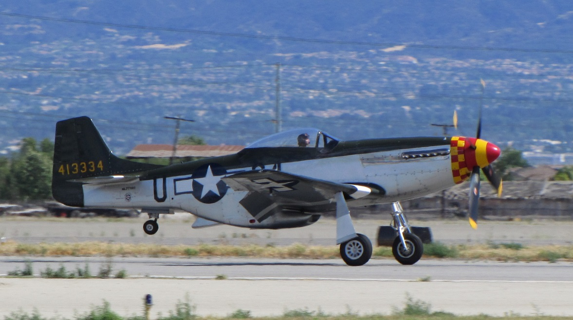 North American P-51D Mustang S/N : 44-84961 FAA Registration : NL7715C Planes of Fame Air Museum PLANES OF FAME AIRSHOW 2015 2015年5月1日撮影